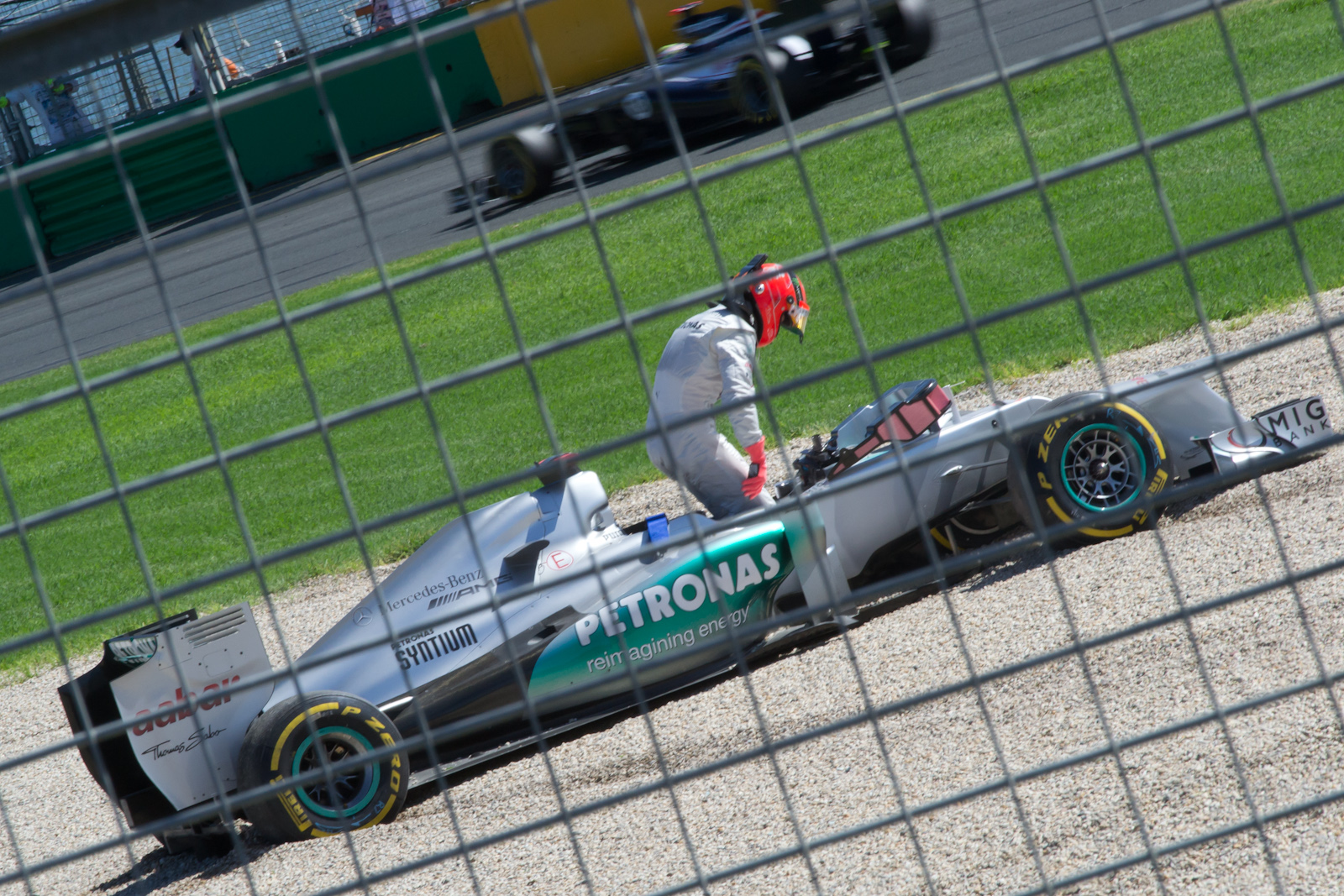 2012 Australian Grand Prix — Michael Schumacher